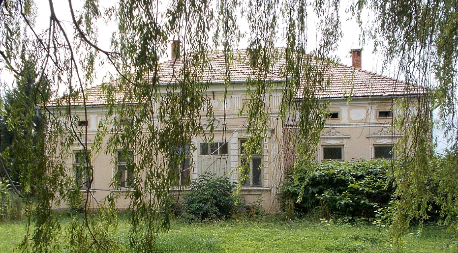 A szárhegyi Angi-kúria (Angi István, magyar országgyűlési képviselő 1949-ben kisajátított lakhelye, ma a Román Állami Burgonyatermesztési Kísérleti Állomás szárhegyi részlegének raktára)